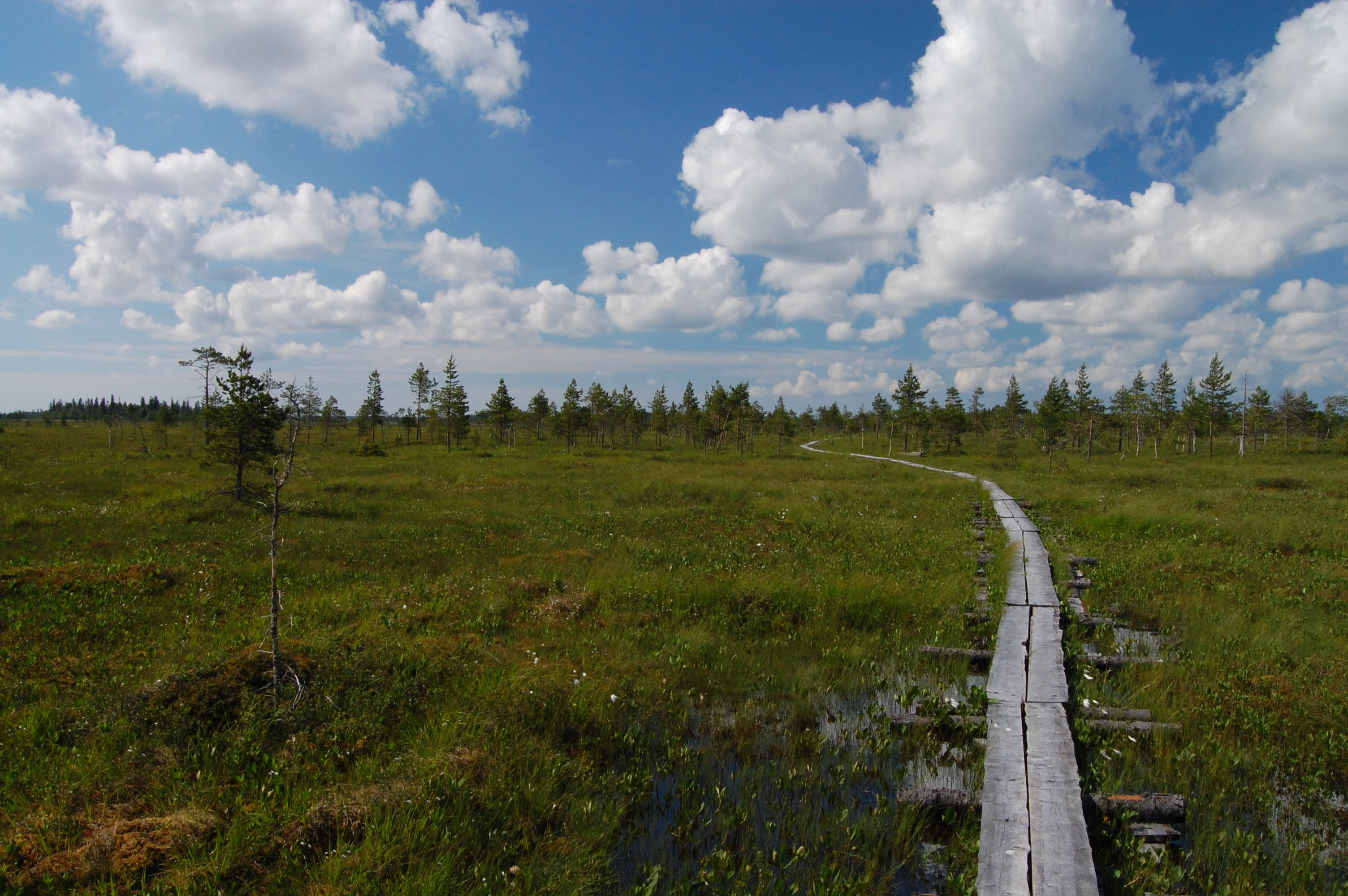 Martimoaavan alueen soista suurinosa on aapasoita